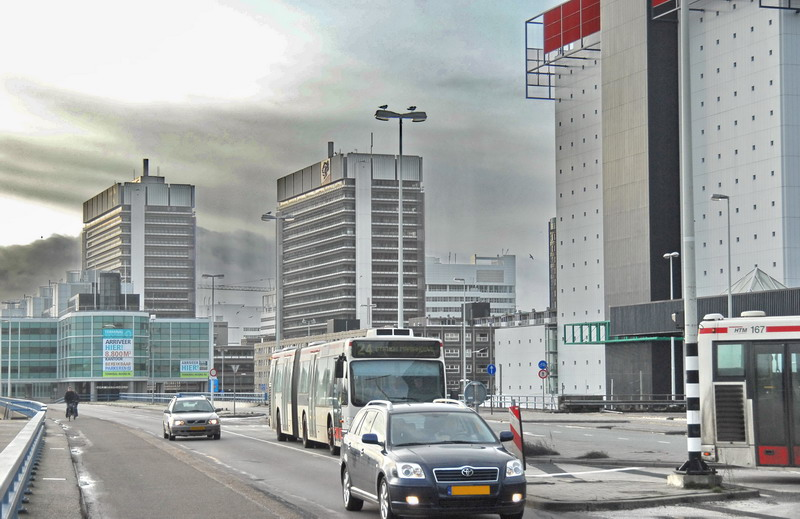 Ministeries van Justitie en Binnenlandse Zaken. Staande op Prins Bernhard viaduct met je gezicht naar het busstation van Den Haag Centraal zie je aan de overkant 3 gebouwen. Het meest rechtse (nog net zichtbaar) is het Ministerie van VROM. Daarnaast Binnenlandse Zaken en uiterst links Justitie. Het is de bedoeling dat er voor BiZa en Justitie nieuwbouw komt. Daarvoor dient eerst de Zwarte Madonna gesloopt te worden, een wooncomplex van architect Carel Weeber, dat naast de ministeries ligt. Men hoopt in 2007 met de sloop te beginnen.